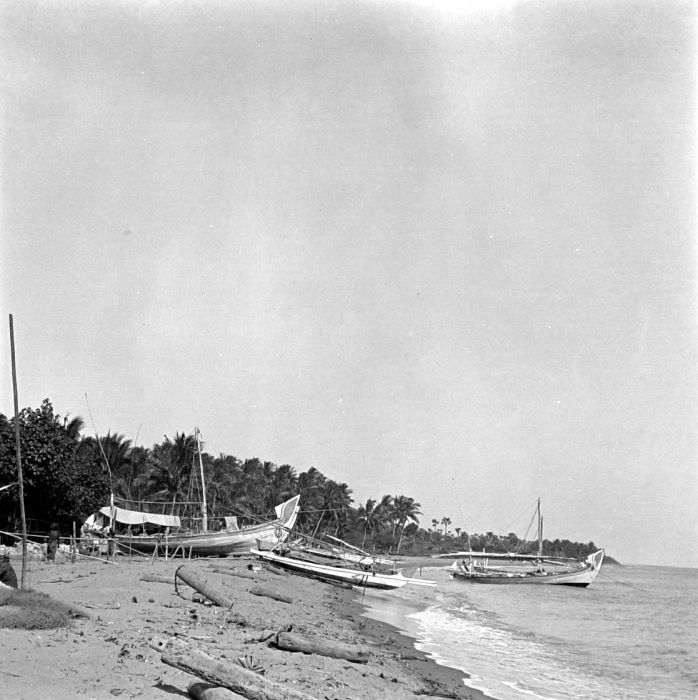 Repronegatief. Zeestrand met prauwen te Pasian